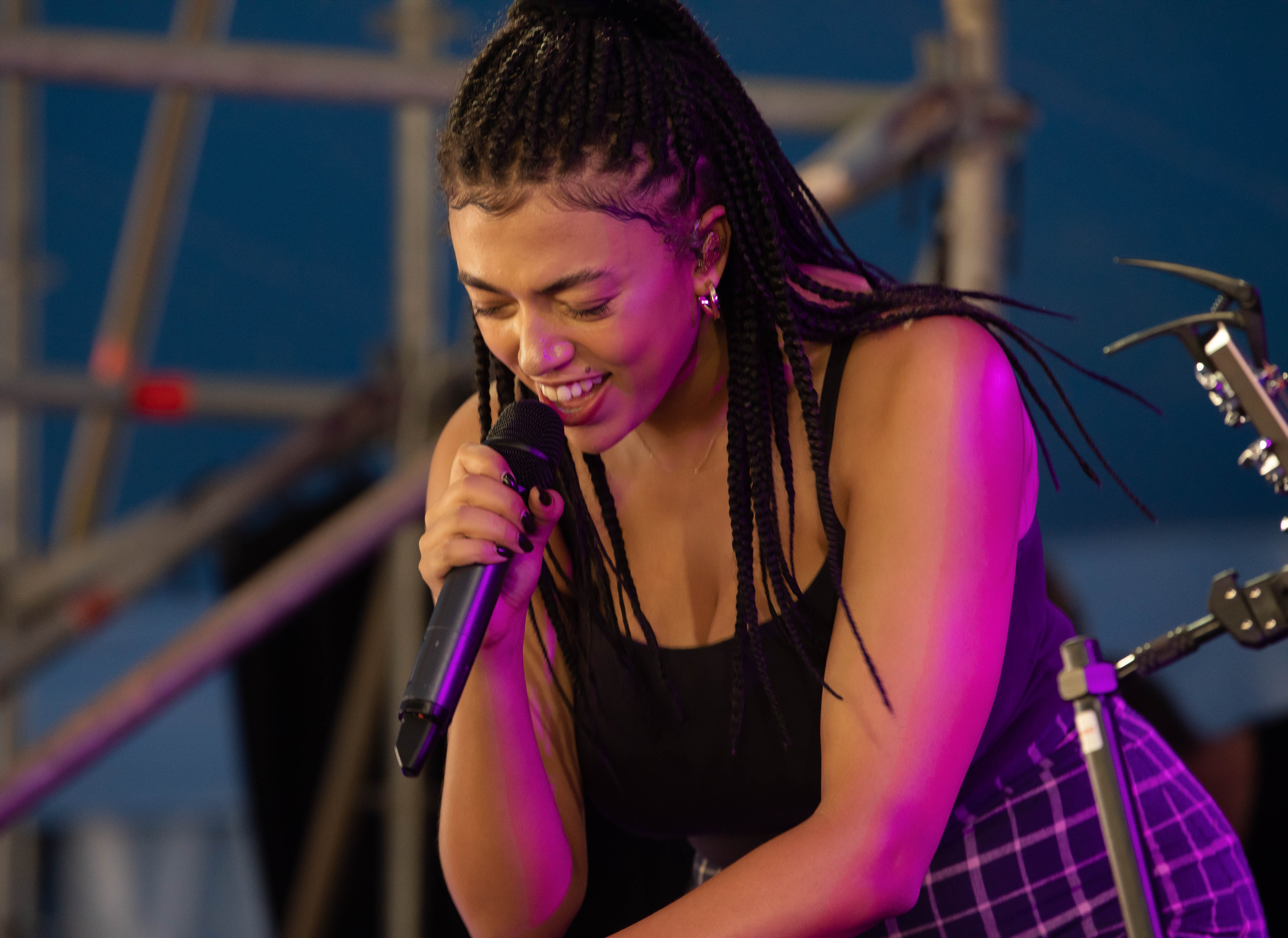 Mahalia